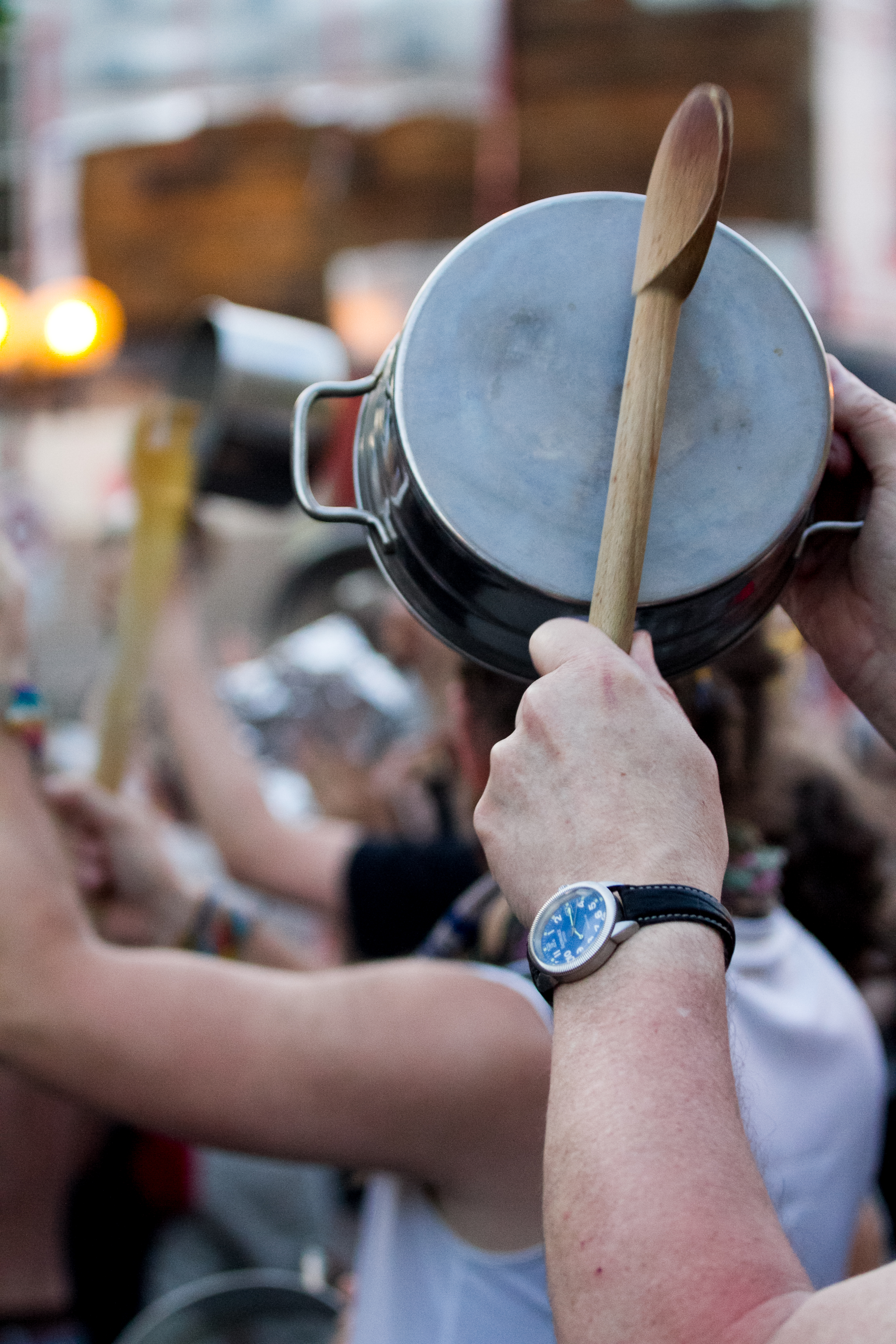 Manifestation de casseroles contre la Loi 78 dans le quartier Rosemont de Montréal, le 24 mai 2012.